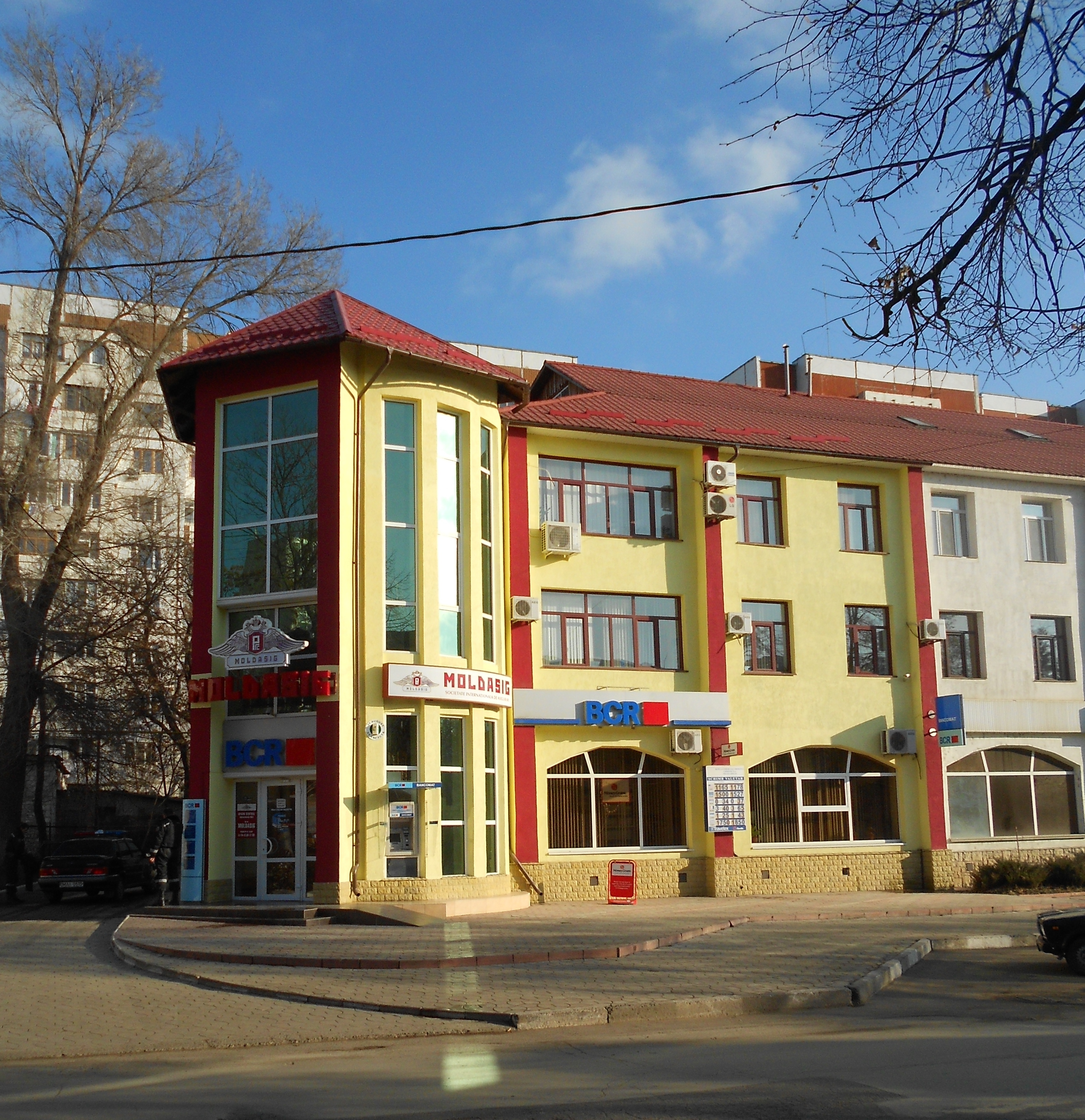 Sediul Băncii Comerciale Română, sucursula Chișinău (filiala Bălți) şi Companiei de asigurări "Moldasig"